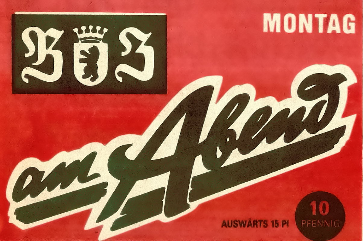 Logo der DDR Zeitung BZ am Abend bis 1990